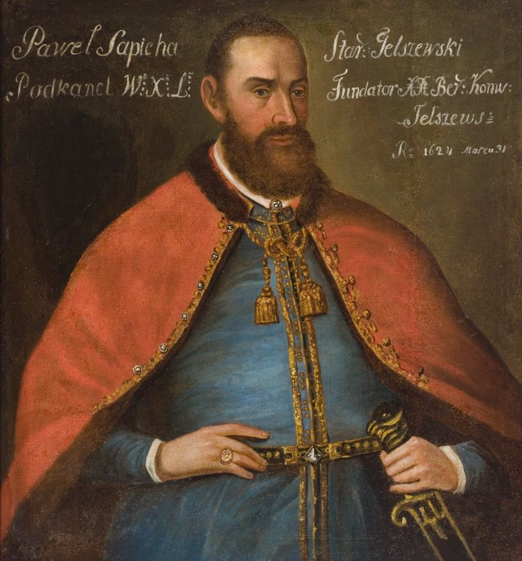 Беларуская (тарашкевіца): Партрэт Паўла Стэфана Сапегі (Pavał Stefan Sapieha) гербу «Ліс» (1565—1635), дзяржаўнага і вайсковага дзеяча Вялікага Княства Літоўскага, канюшага вялікага і падканцлера літоўскага.